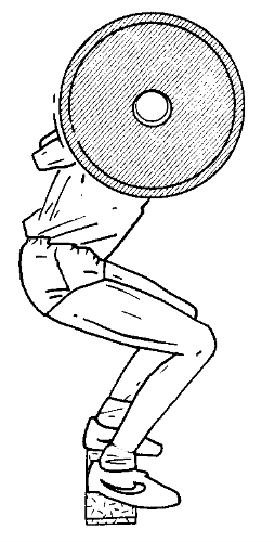 Musculation exercice squats 2.png